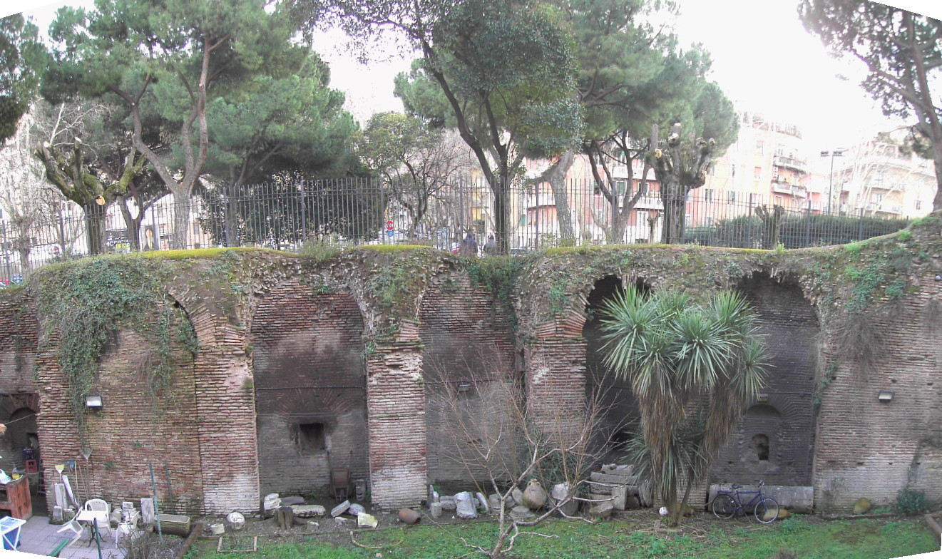 Roma , Mura Aureliane a via della Ferratella (tra Porta Asinaria e Porta Metronia) lato interno